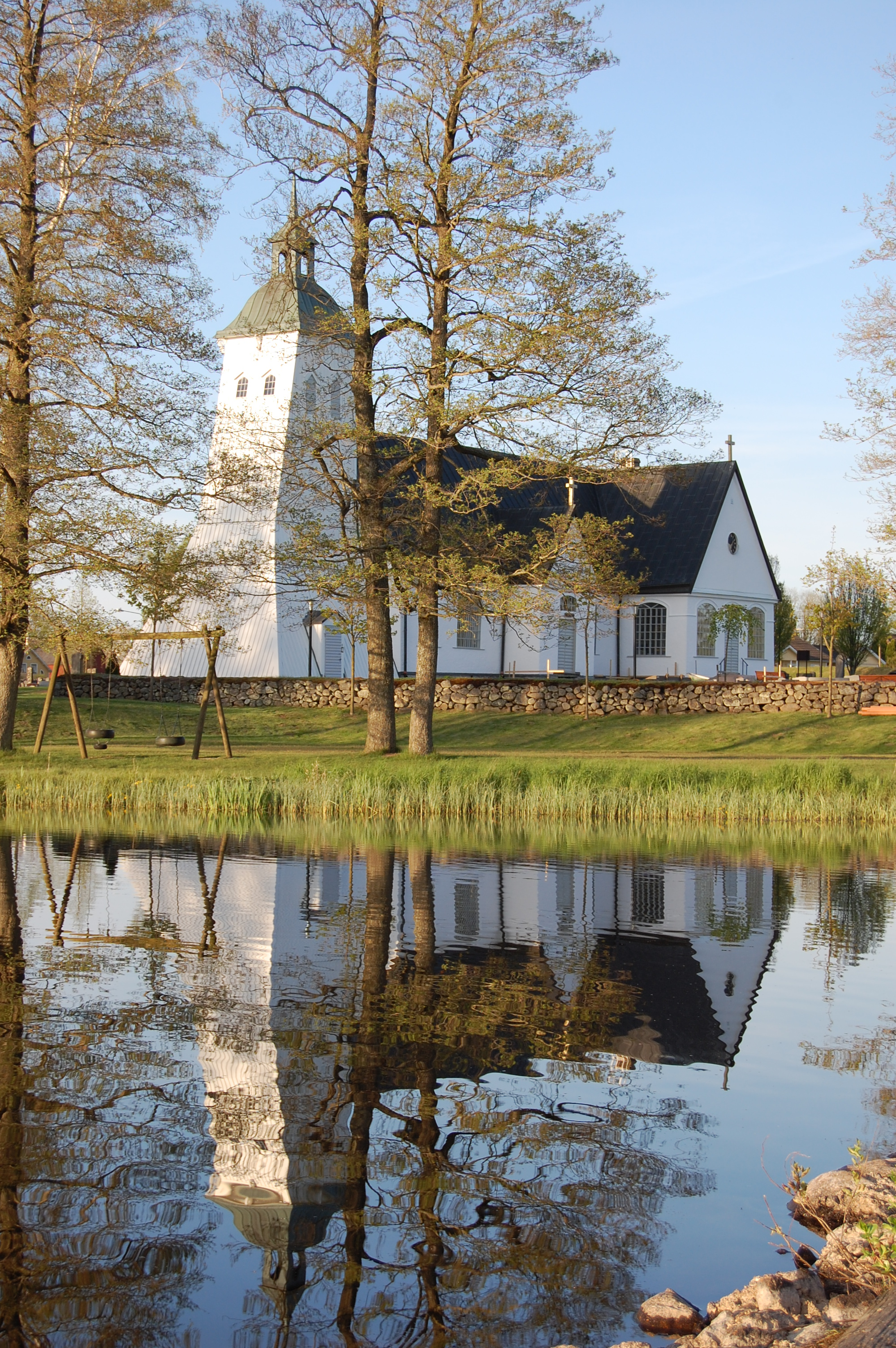 Tävelsås kyrka som sedd från badbryggan bakom skolan.